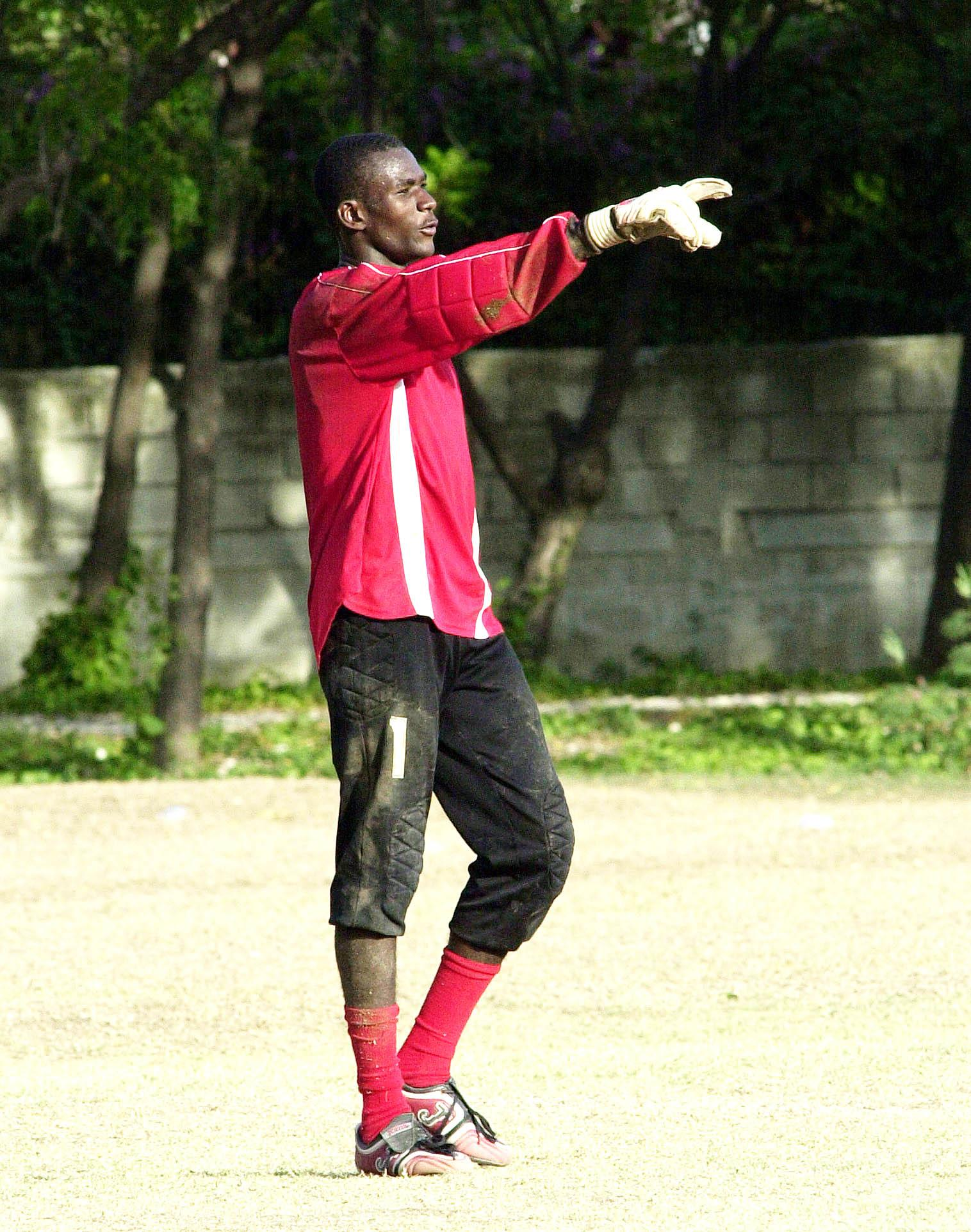 Brasília - Porto-Príncipe, Haiti - O Goleiro da seleção do Haiti, Gobart Fenelar (23 anos), durante o treino do time.